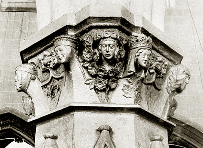 Figurenkapitell in der Bartholomäuskirche (von Nordwesten): Trias der Hauptpersonen (bauzeitlich)